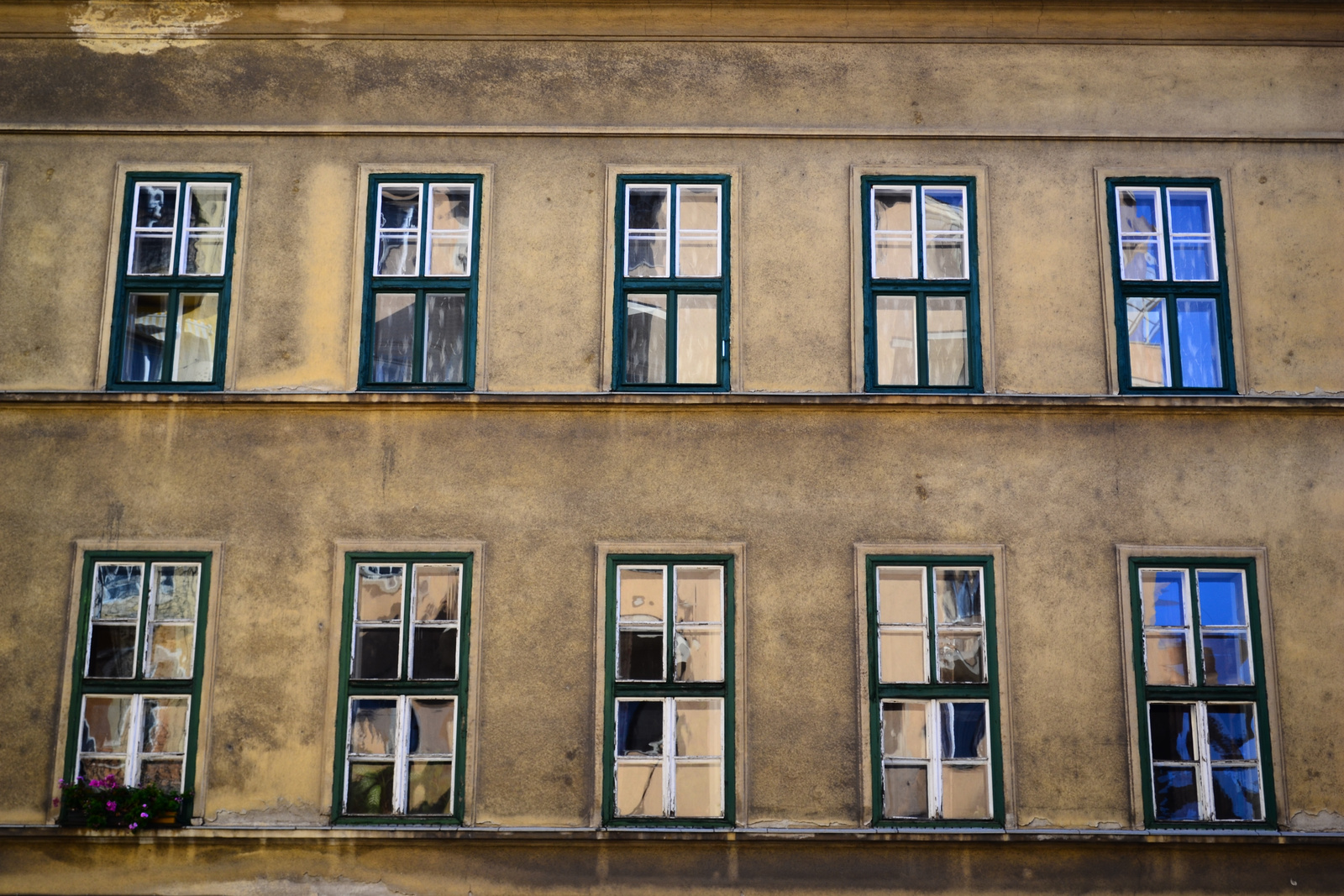 Lakóház (Budapest 7, Klauzál tér 13., Dob utca 45.) This is a photo of a monument in Hungary, Identifier: 11623